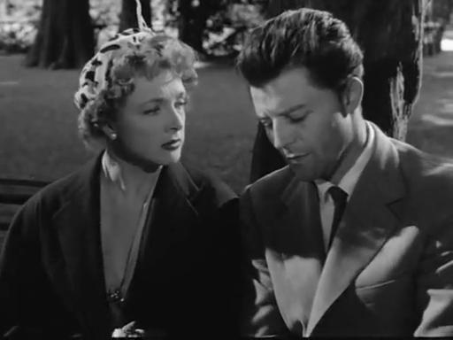 Scena del film